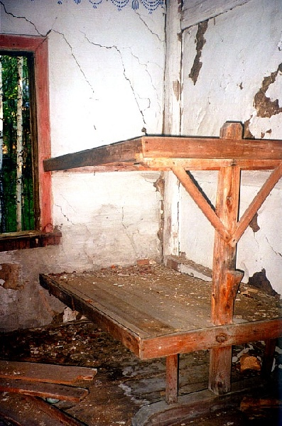 Pritsche in einem Gulag des Projekts 503 nahe dem Jenissei